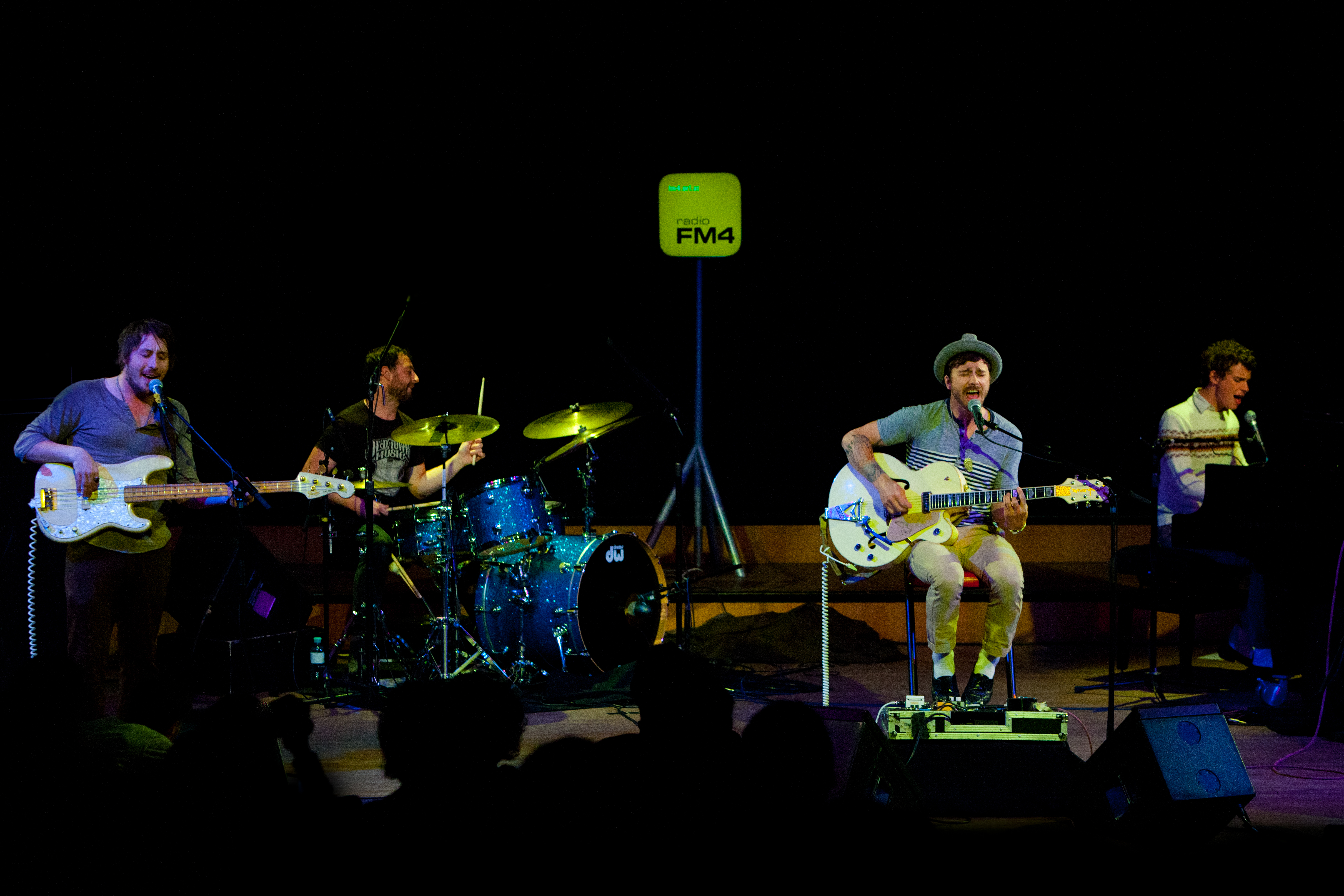 Portugal. The Man